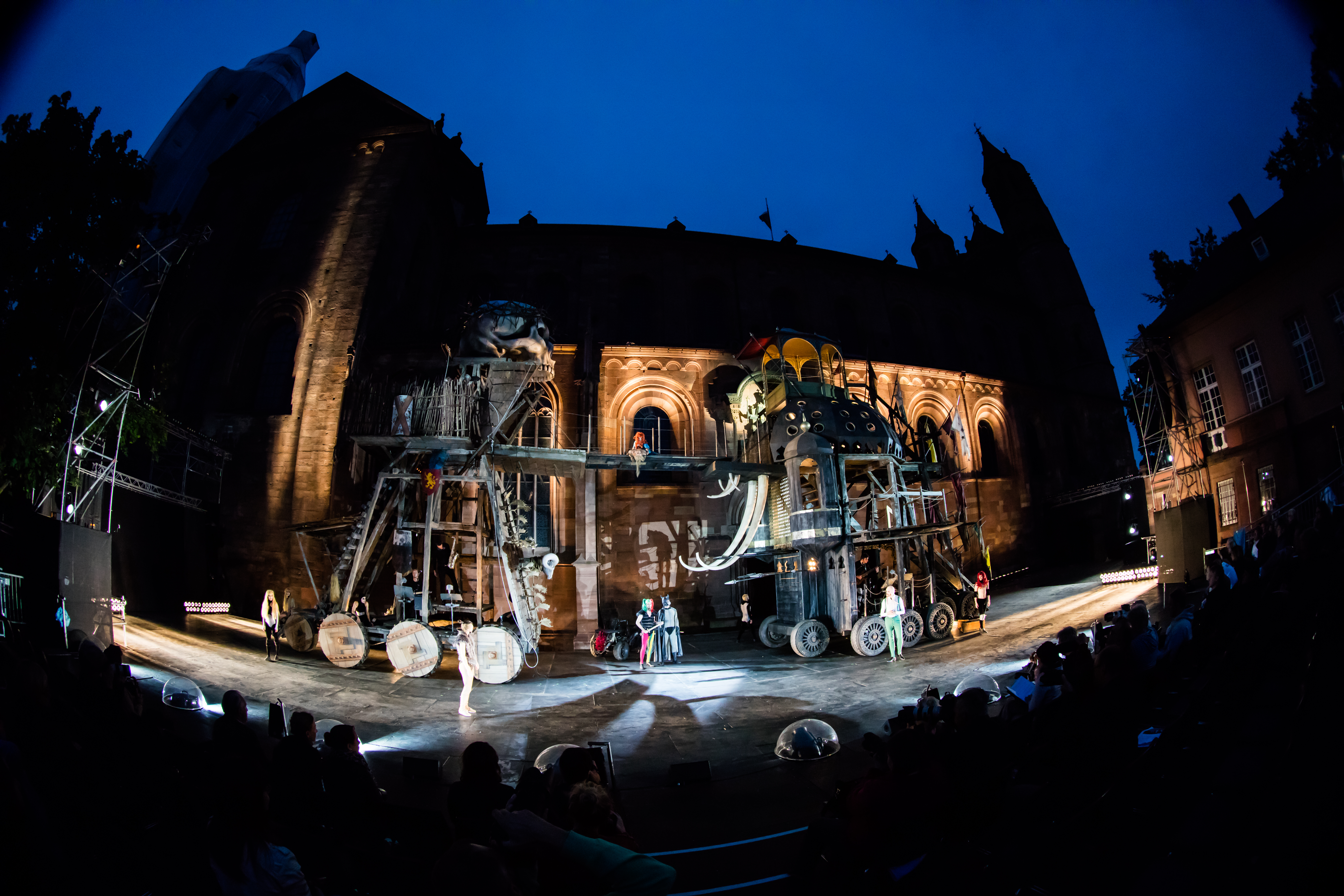 Nibelungenfestspiele Worms Gemetzel 2015 Nordseite Wormser Kaiserdom Nico Hofmann (Intendant), Albert Ostermaier (Autor), Thomas Schadt (Regisseuer) Enemble: Alina Levshin (Ortlieb), Maik Solbach (Narr), Judith Rosmair (Kriemhild), Catrin Striebeck (Brünhild), Markus Boysen (Etzel), Heiko Pinkowski (Dietrich), Max Urlacher (Hagen), Holger Kunkel (Gunter), Gabriel Raab (Gernot), Peter Becker (Giselher), Tom Radisch (Volker), Marion Breckwoldt (Zofe), Radu Cojocariu (Erzähler)